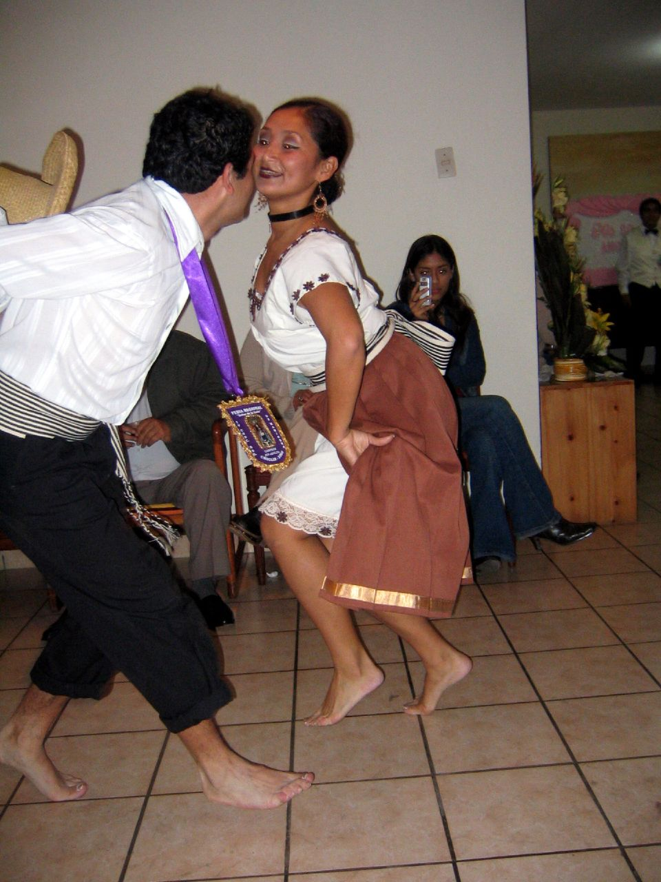 Tondero (2)